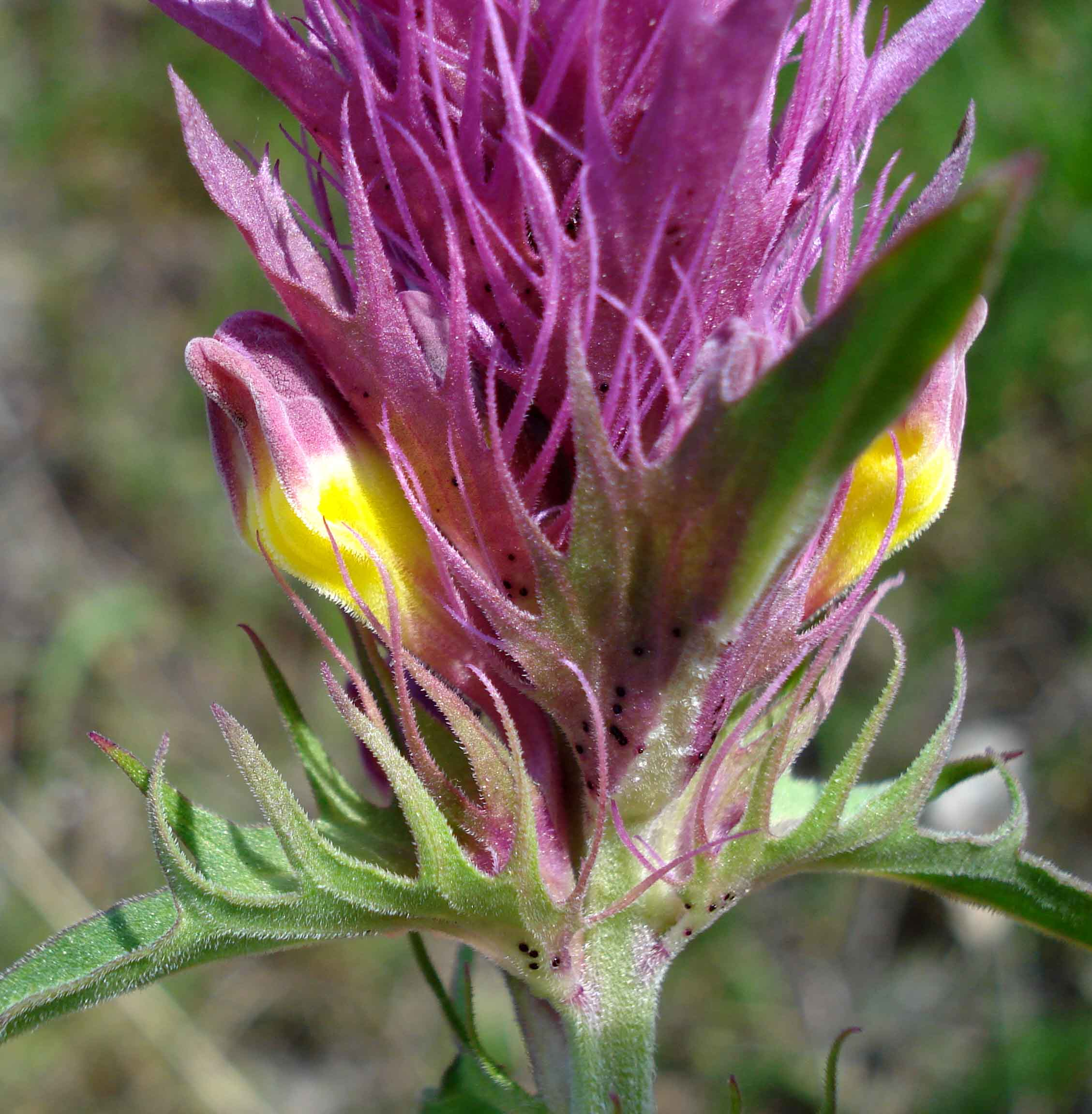 Melampyrum arvense (Unterfranken, Germany)